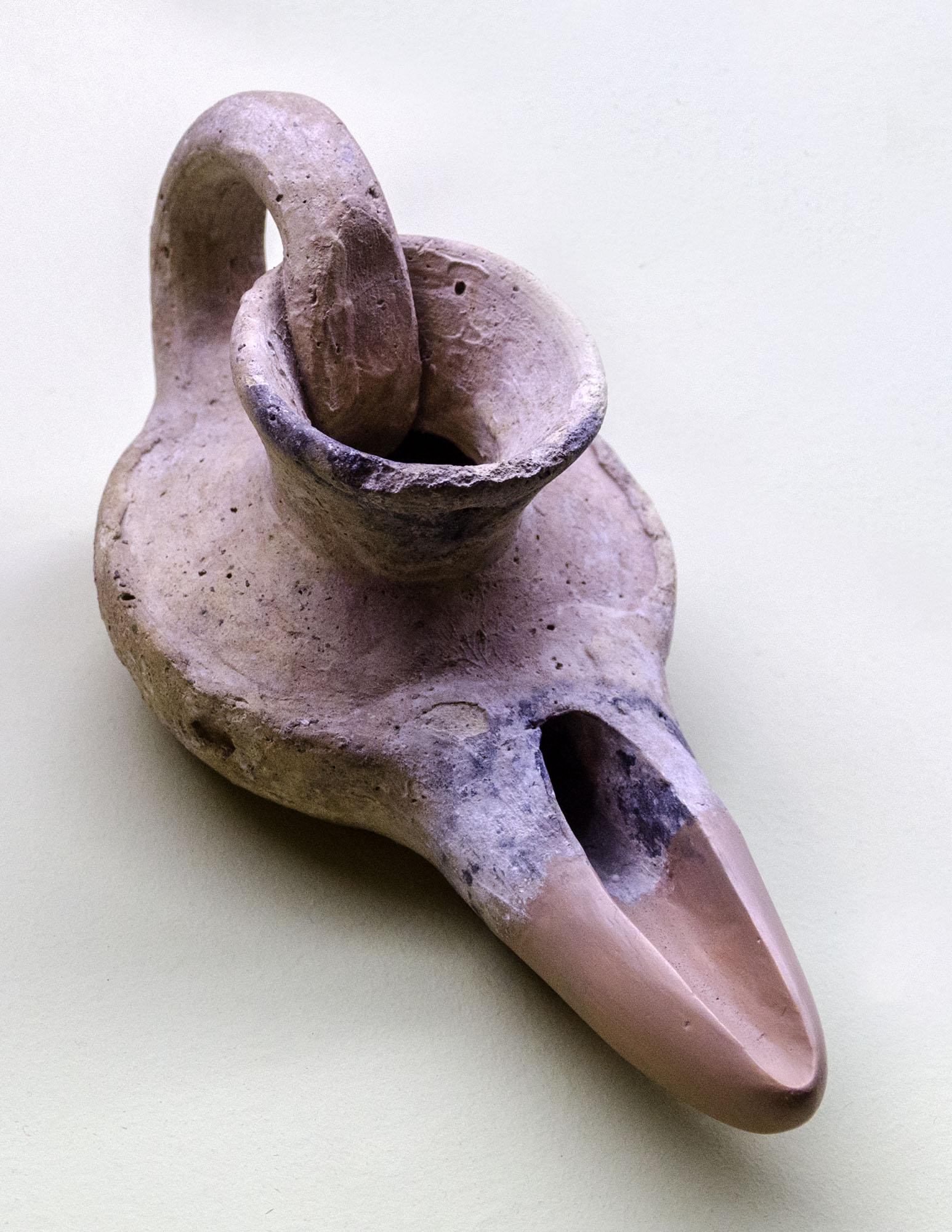 Se encontró en Puente Tablas, Jaén y esta datado en la época califal, sifglos X-XI